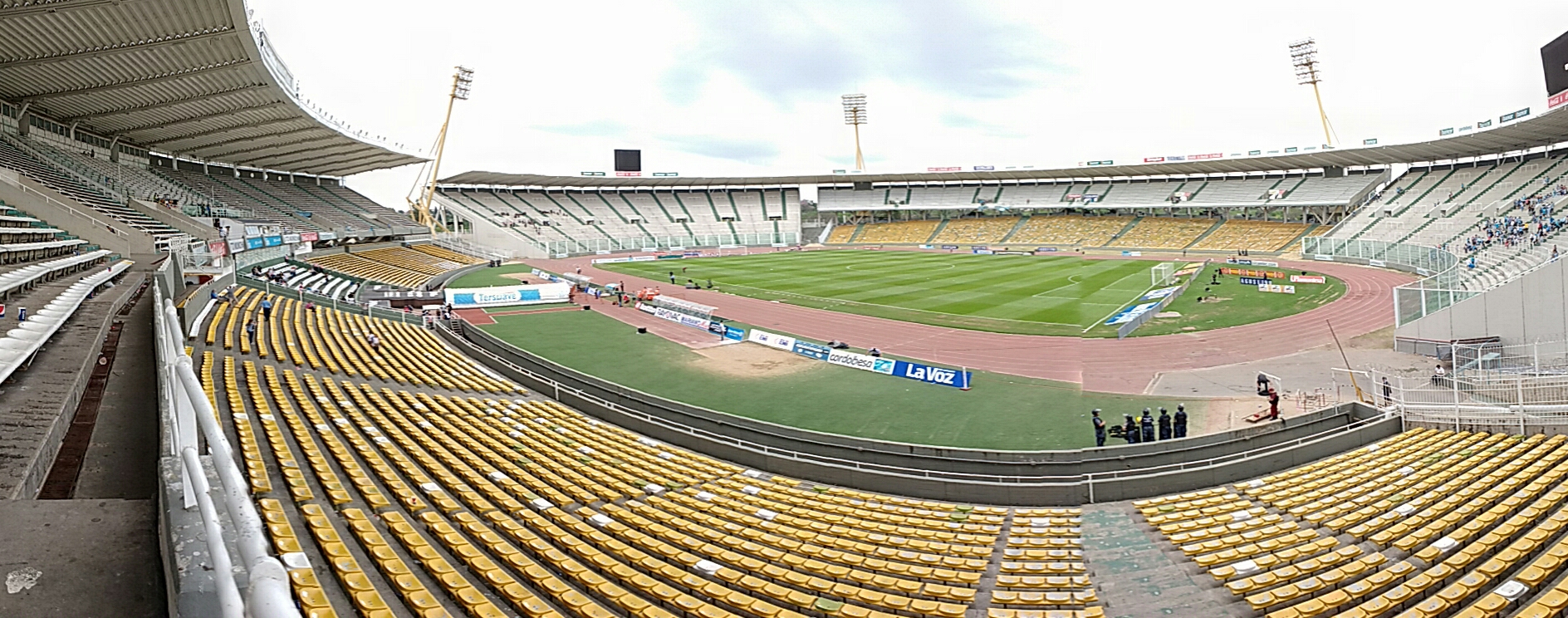 Vaciado luego de Belgrano - Aldosivi del Torneo 2016/2017